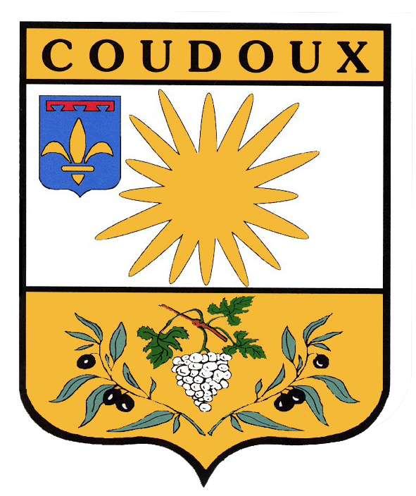 D'or portant en chef le mot Coudoux de sable. En pointe de l'écu, une grappe de raisins d'argent adossée de deux palmes d'olivier de sinople. Une fleur de lys d'or. Au centre, une comète à 16 rais d'or.